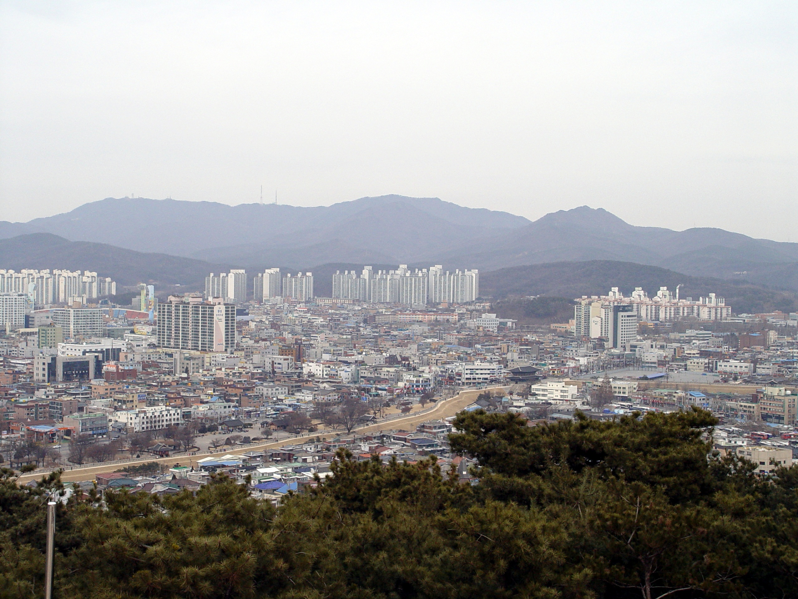 Gwanggyosan seen from Hwaseong, Suwon